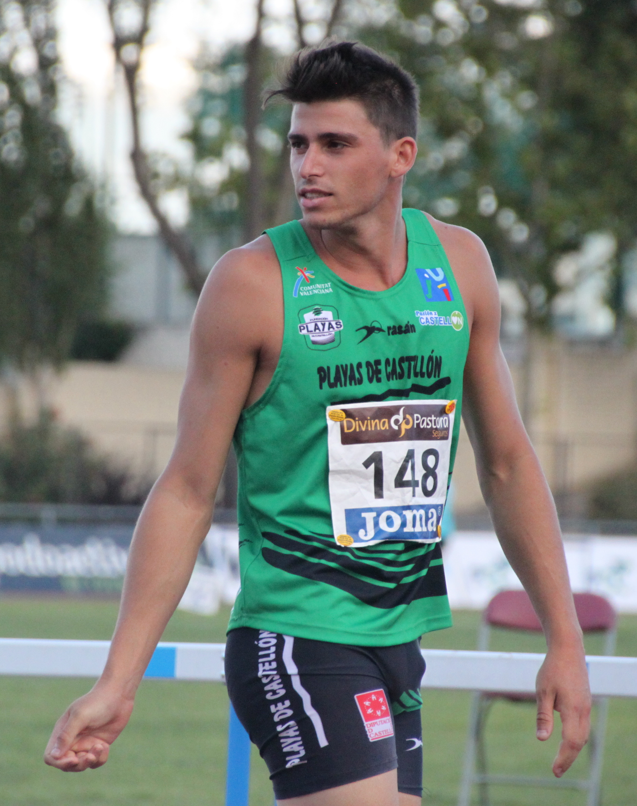 Vicente Docavo en Alcobendas 2013